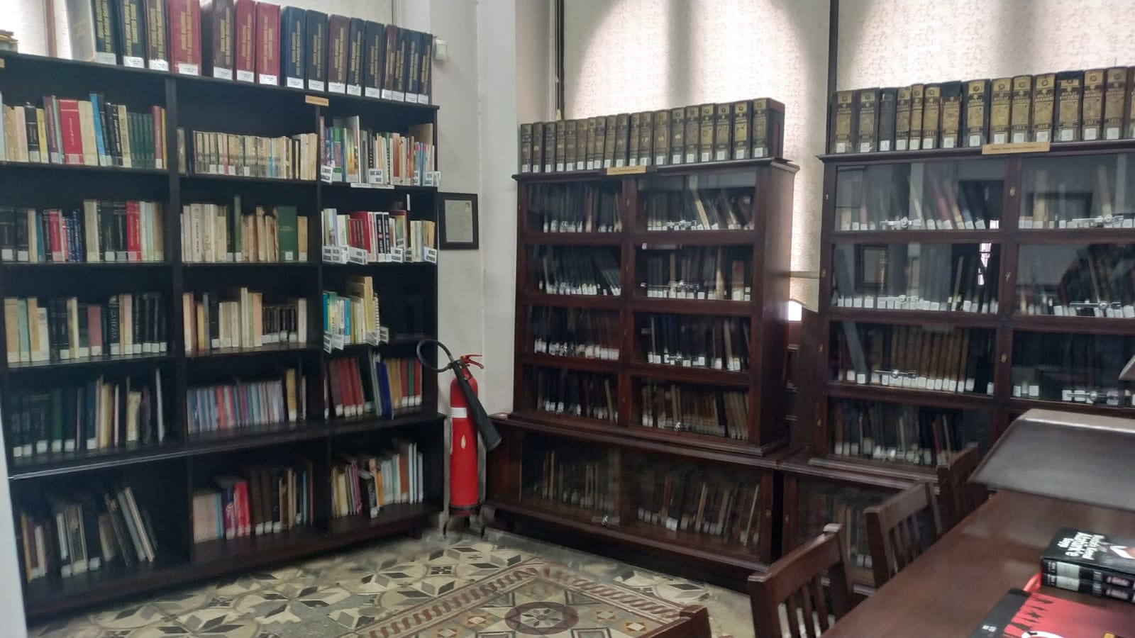 Ödemiş Yıldız Kent Arşivi ve Müzesi Kütüphanesi Kütüphanesi